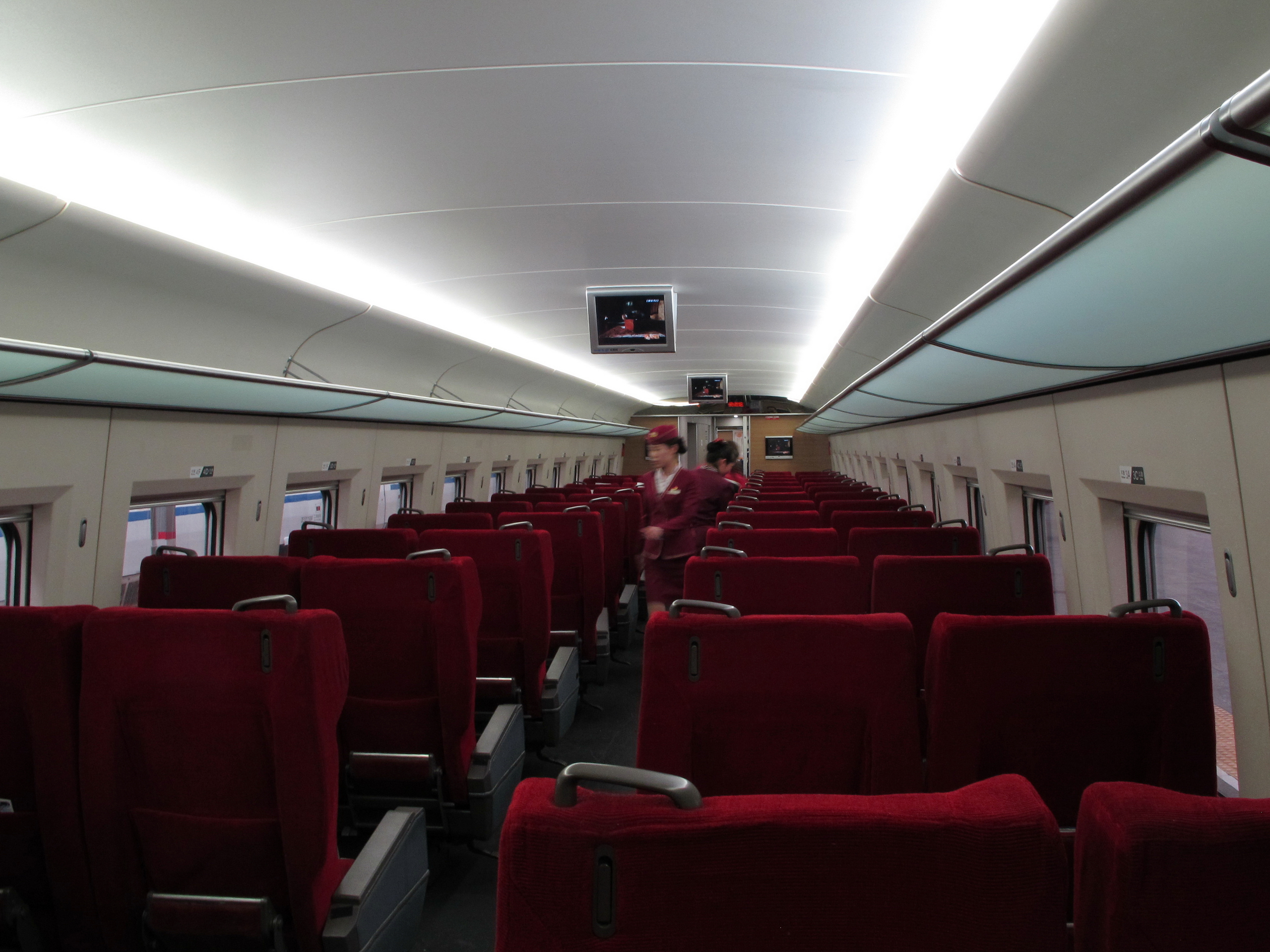 中文（中国大陆）: CRH380A型动车组的一等座车